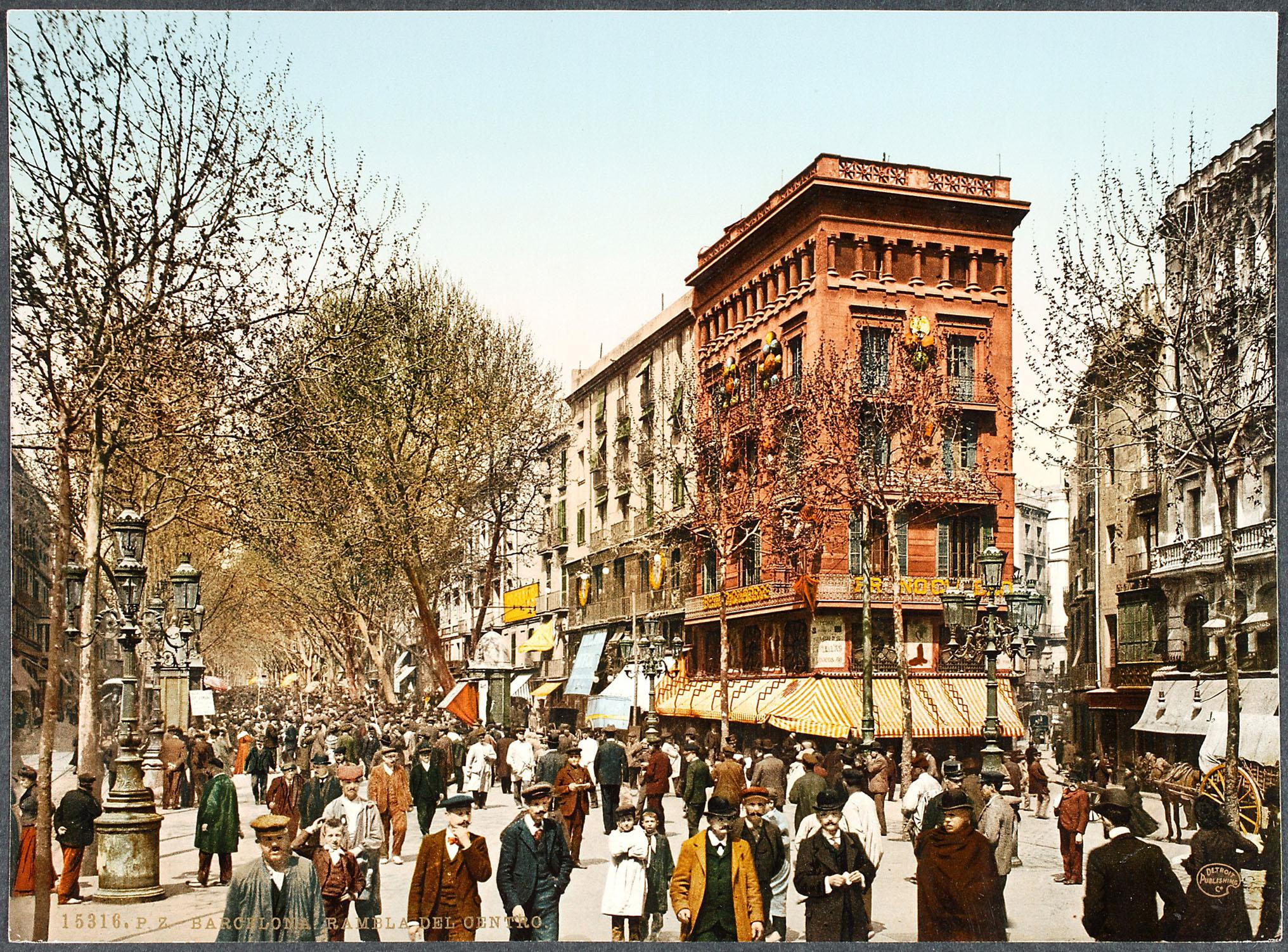 Rambla Central, Barcelona, fotografía anónima (1880 (ca.) / Copia ca. 1890). Fotocromo sobre papel. Colección del Museo Nacional Centro de Arte Reina Sofía (Madrid, España)